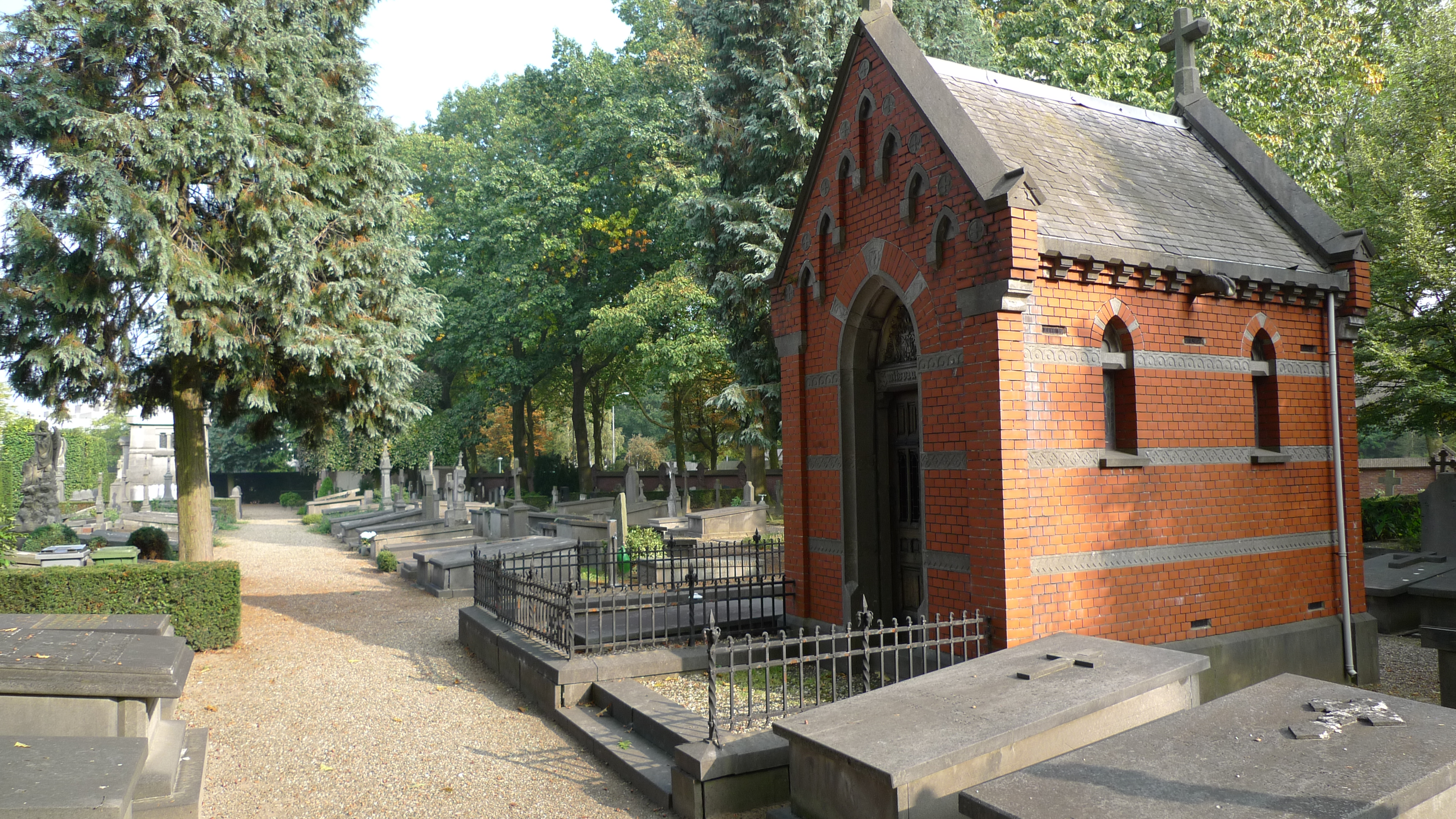 Grafkapel familie Smits van Oyen op begraafplaats Catharinakerk in Eindhoven, Nederlands rijksmonument nr. 518781